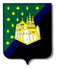 Герб Святогорска